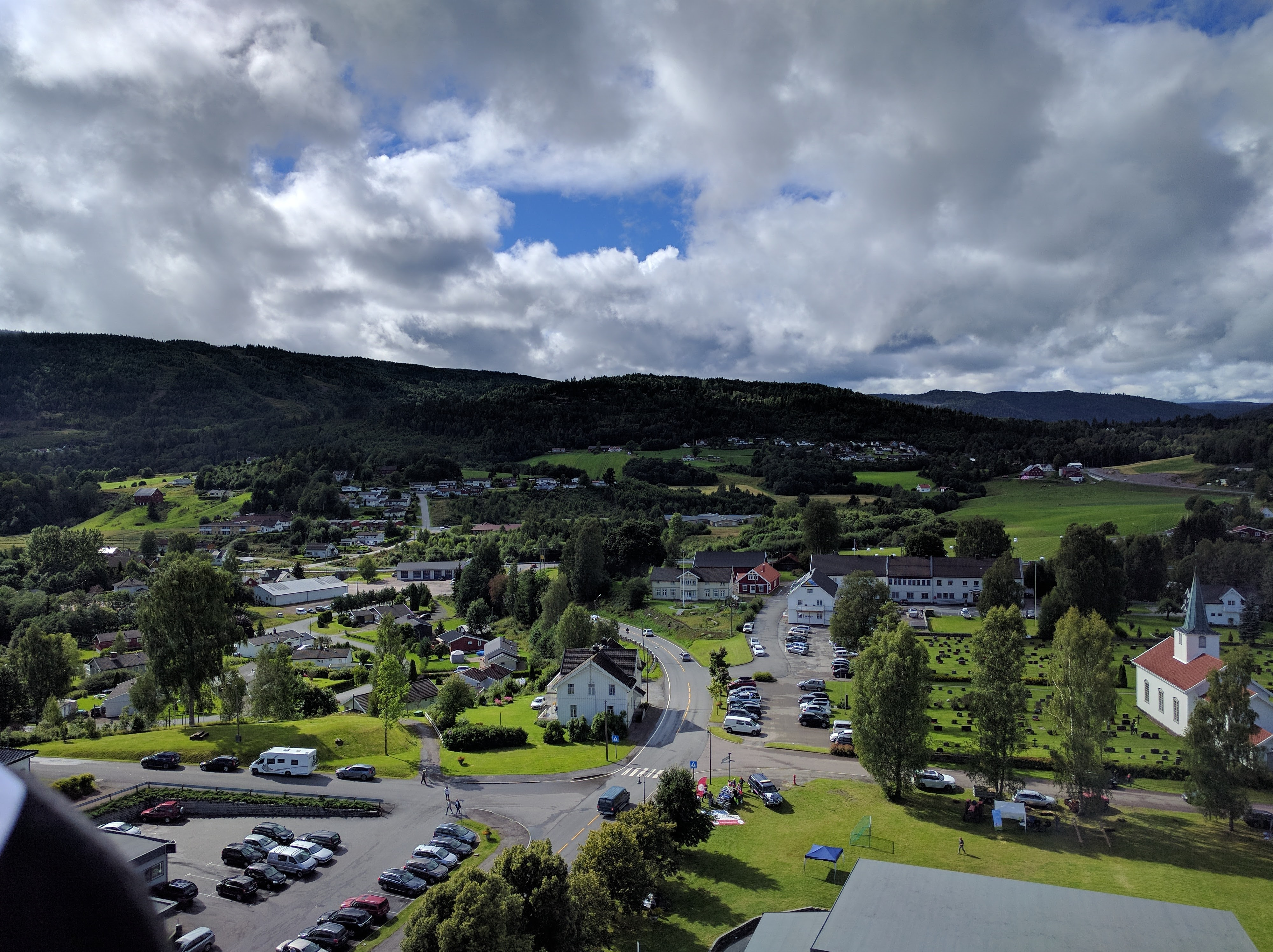 Svarstad fra "fugleperspektiv". Bildet er tatt over Lardal Ungdomsskole og peker vestover.